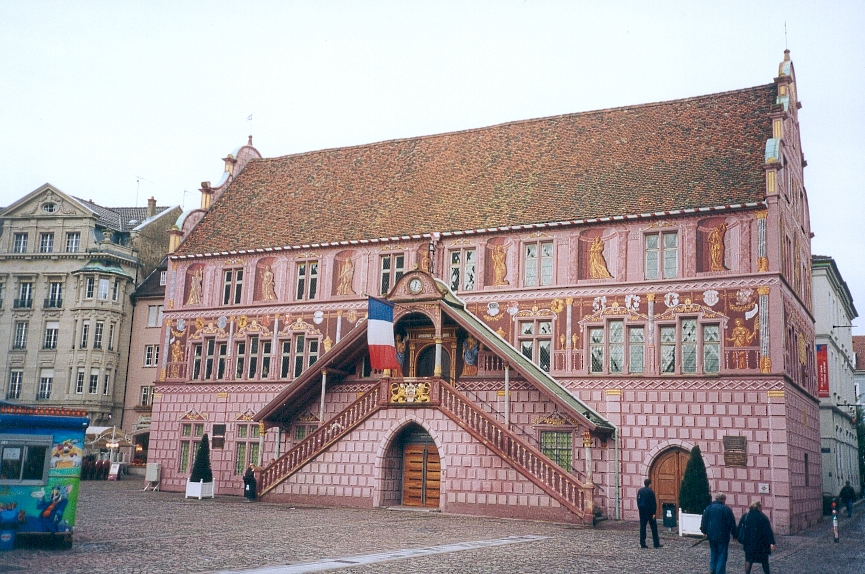 Auteur : FC Georgio Sujet : Hotel de ville de Mulhouse Lieu : Alsace Année : 2000